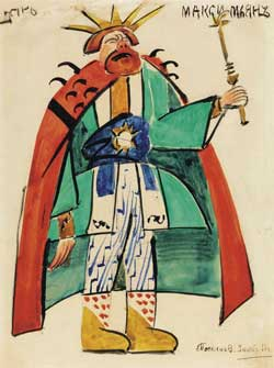 В. Е. Татлин. Эскиз костюма Царя Максемьяна к спектаклю «Царь Максемьян и ево непокорный сын Адольфа». 1911